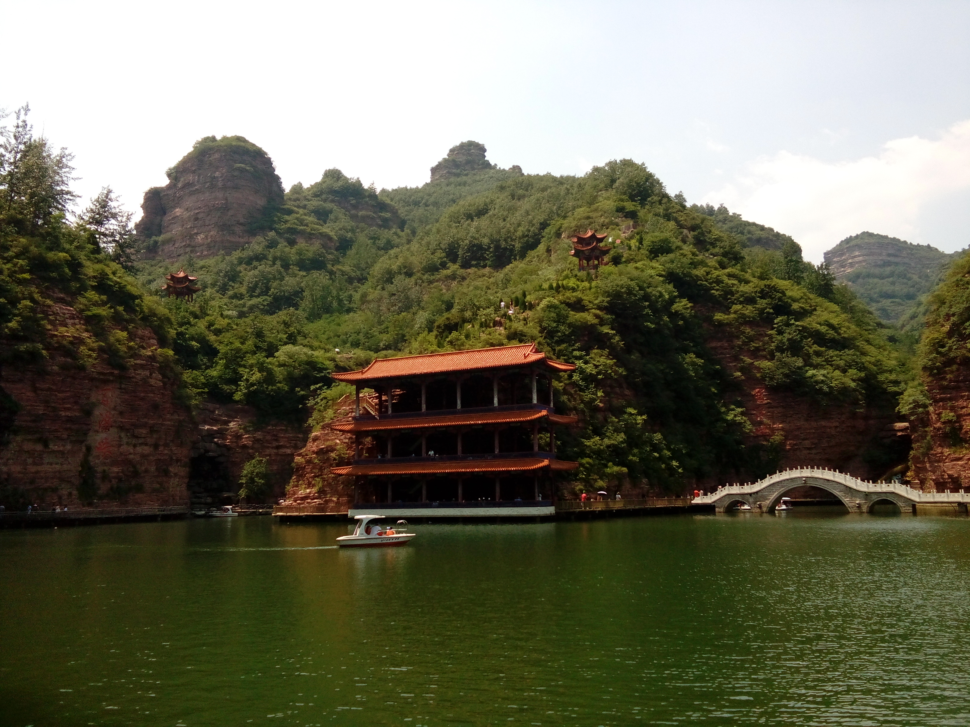 邯郸西部的七步沟景区。